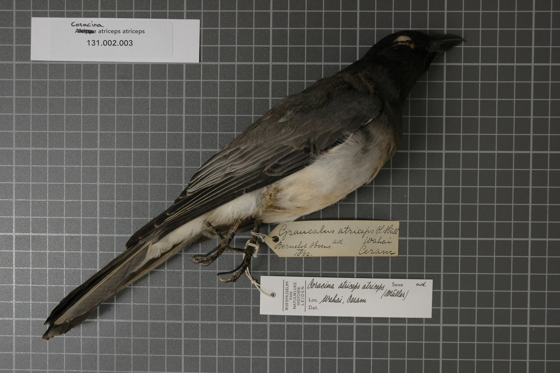 Coracina atriceps atriceps (Muller, 1843)